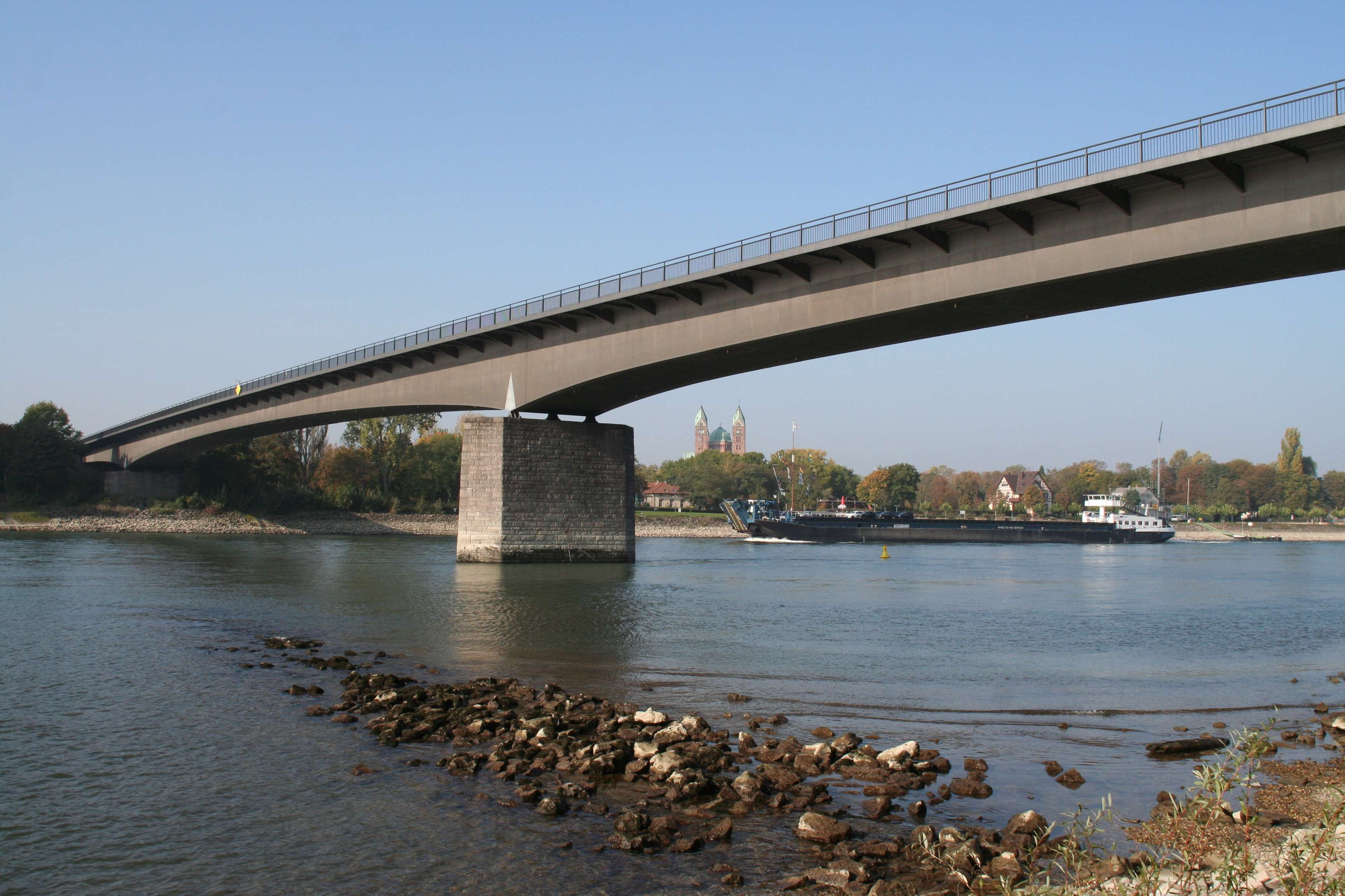 Salierbrücke, Rheinbrücke Speyer B39